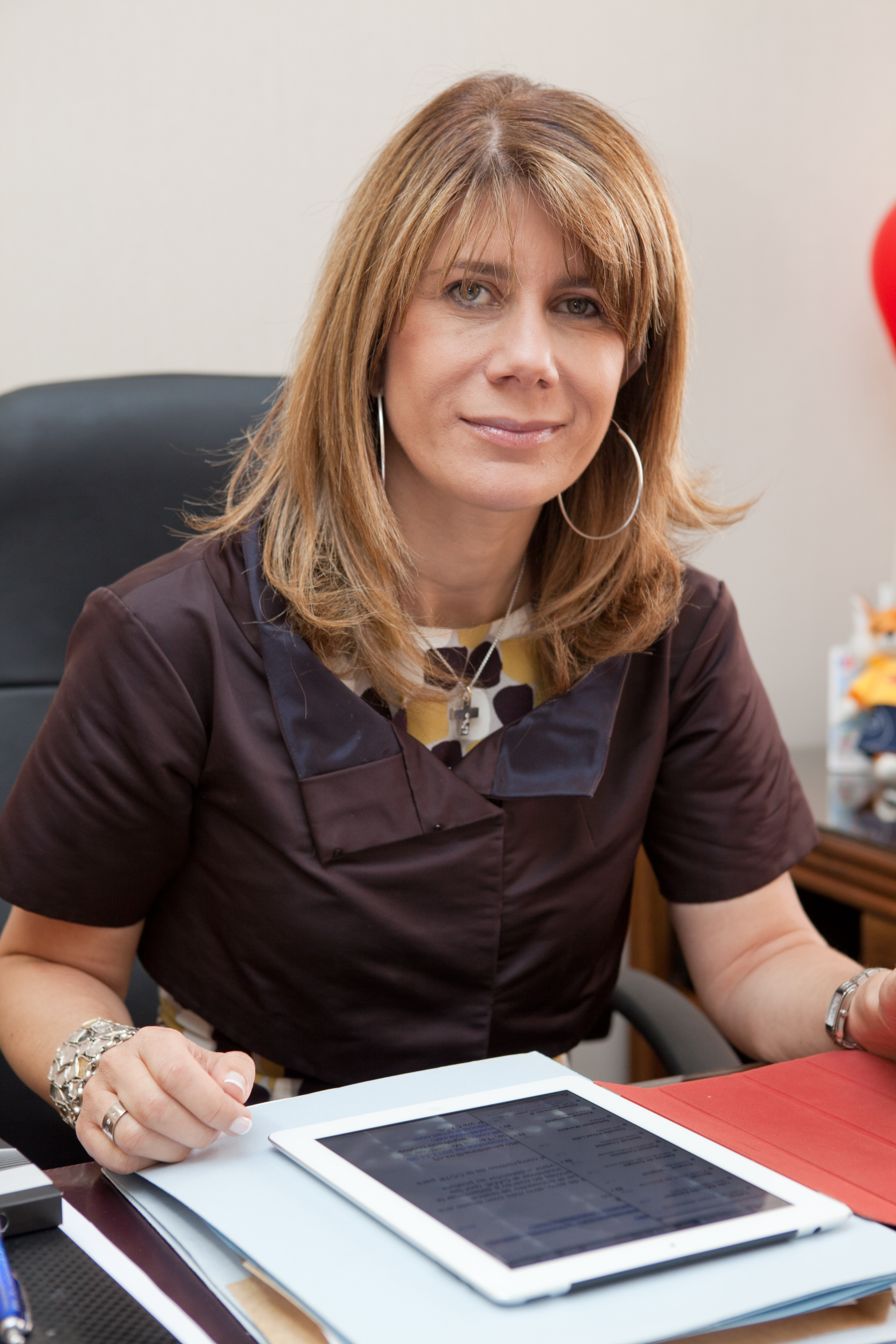 Ximena Cecilia Rincón González (Concepción, 5 de julio de 1968) es una abogada y política chilena. Militante demócratacristiana, ha sido intendenta de la Región Metropolitana en el gobierno de Ricardo Lagos; senadora por la Circunscripción 11 (Maule Sur, que comprende las provincias de Linares y Cauquenes) entre 2010 y 2014; y ministra de Estado en el segundo gobierno de Michelle Bachelet, en las carteras de Secretaría General de la Presidencia y del Trabajo y Previsión Social.